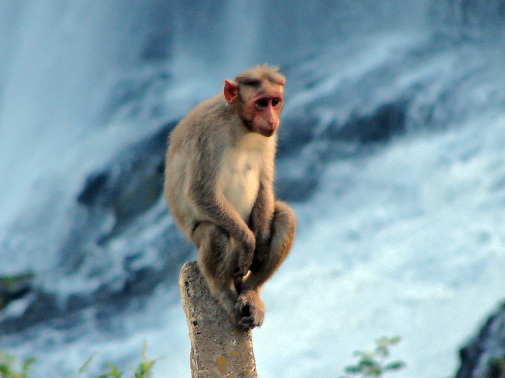 Lonely Monkey, Bonnet macacque Macaca radiata